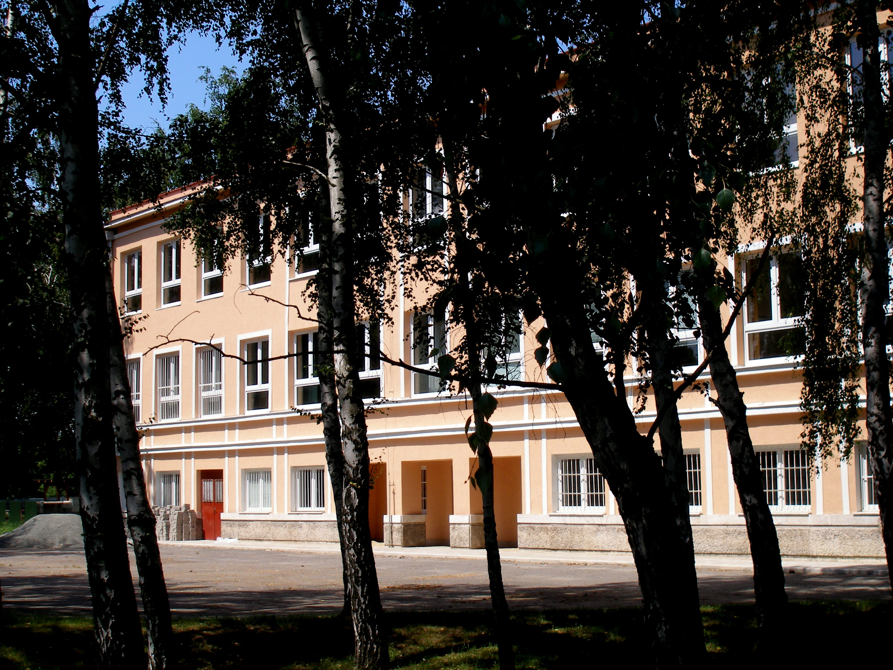 Ulica Narcisová v Prešove.